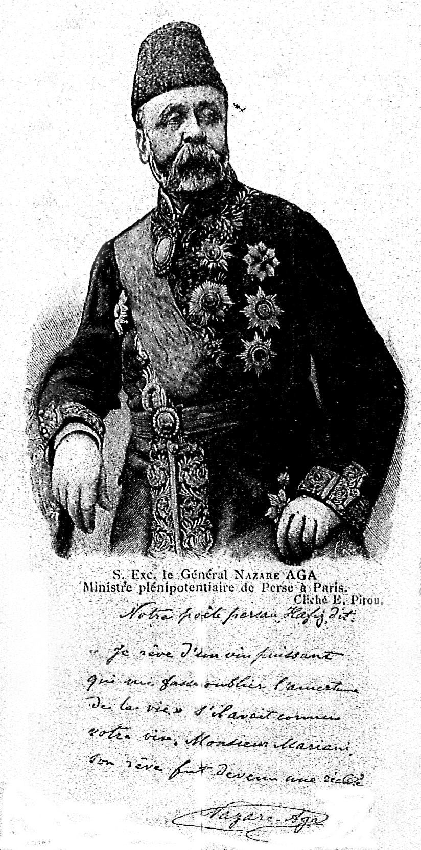 image provenant de la bibliothèque de reims.